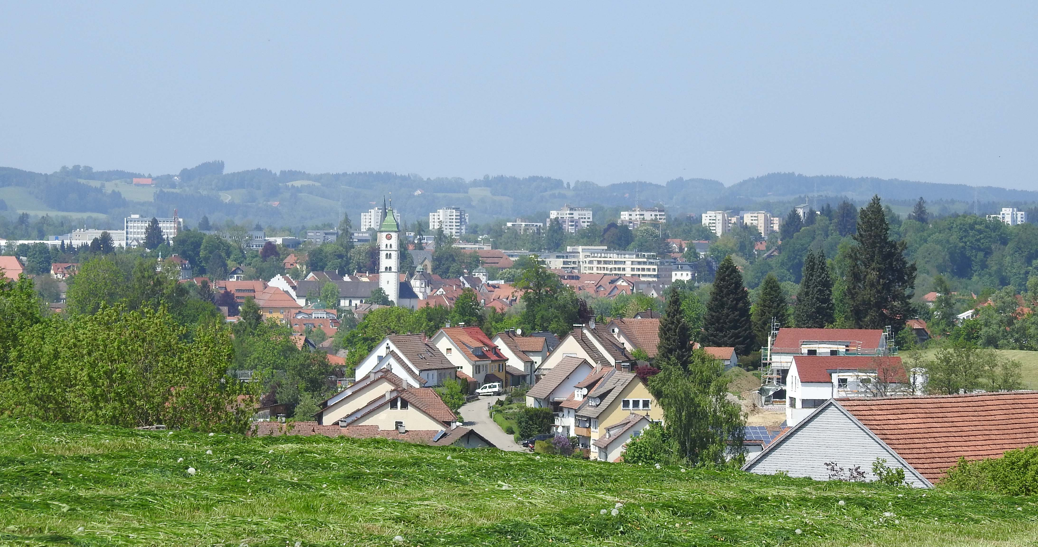 Schwarzenbach von Süden, Hergatz, im Hintergrund Wangen im Allgäu